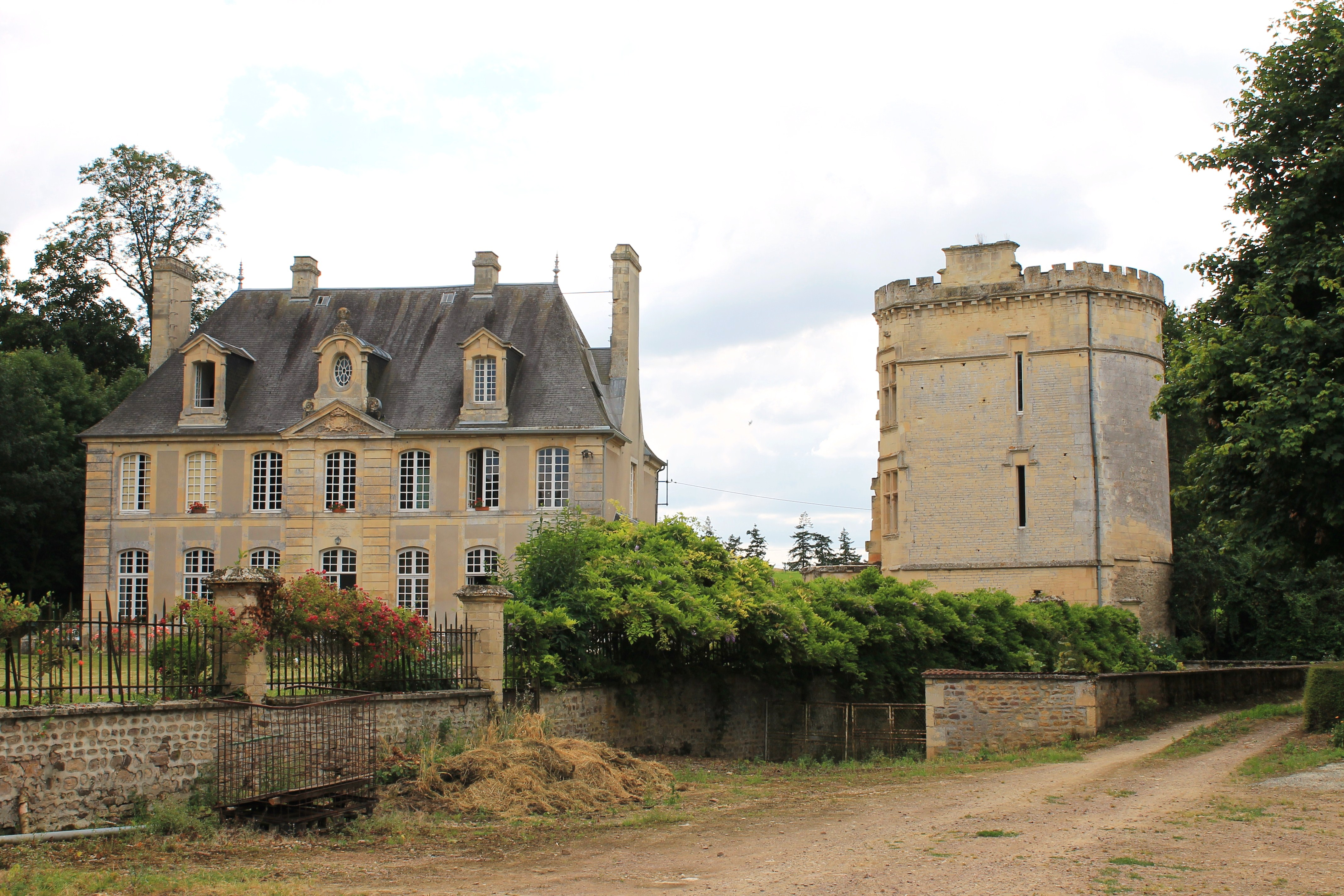 Manoir et tour de l'ancien château, Baron-sur-Odon, Calvados